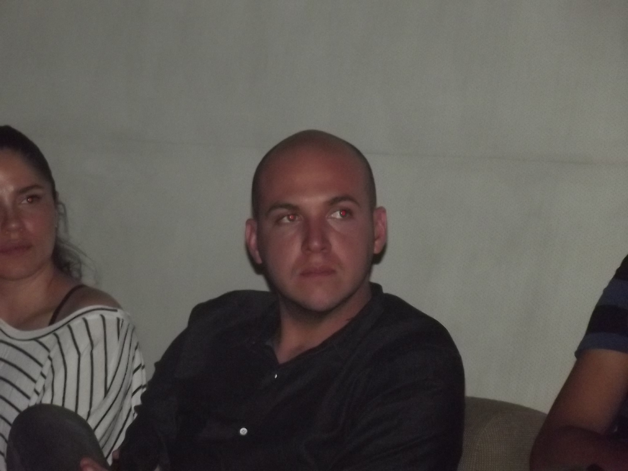 Presentación de la película La tierra y la sombra en el Museo La Tertulia